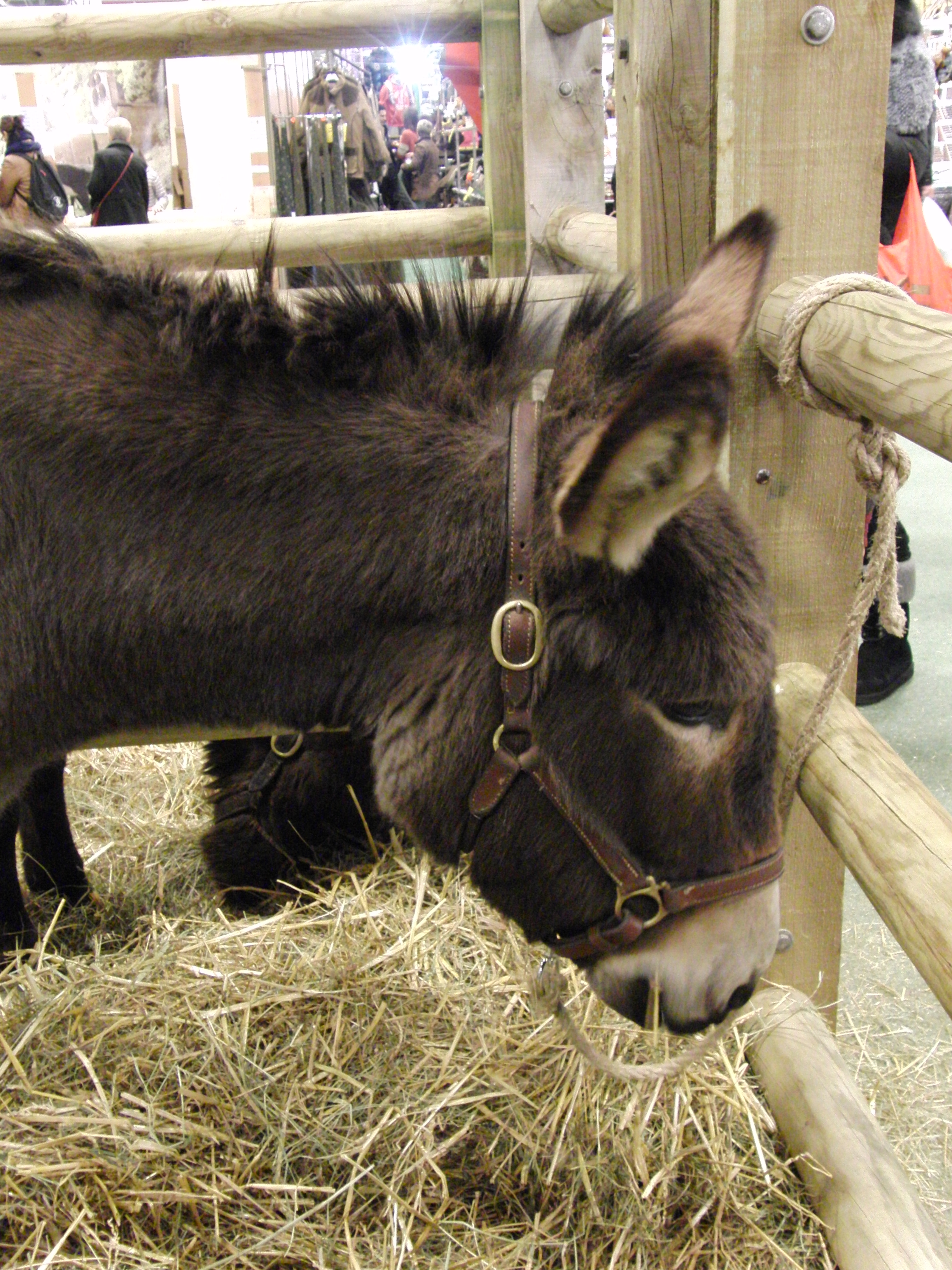 Tête d'un âne normand bâté - Salon international de l'agriculture 2013, Paris, France